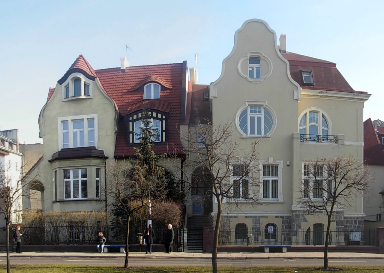 Ulica Mickiewicza 15 w Bydgoszczy